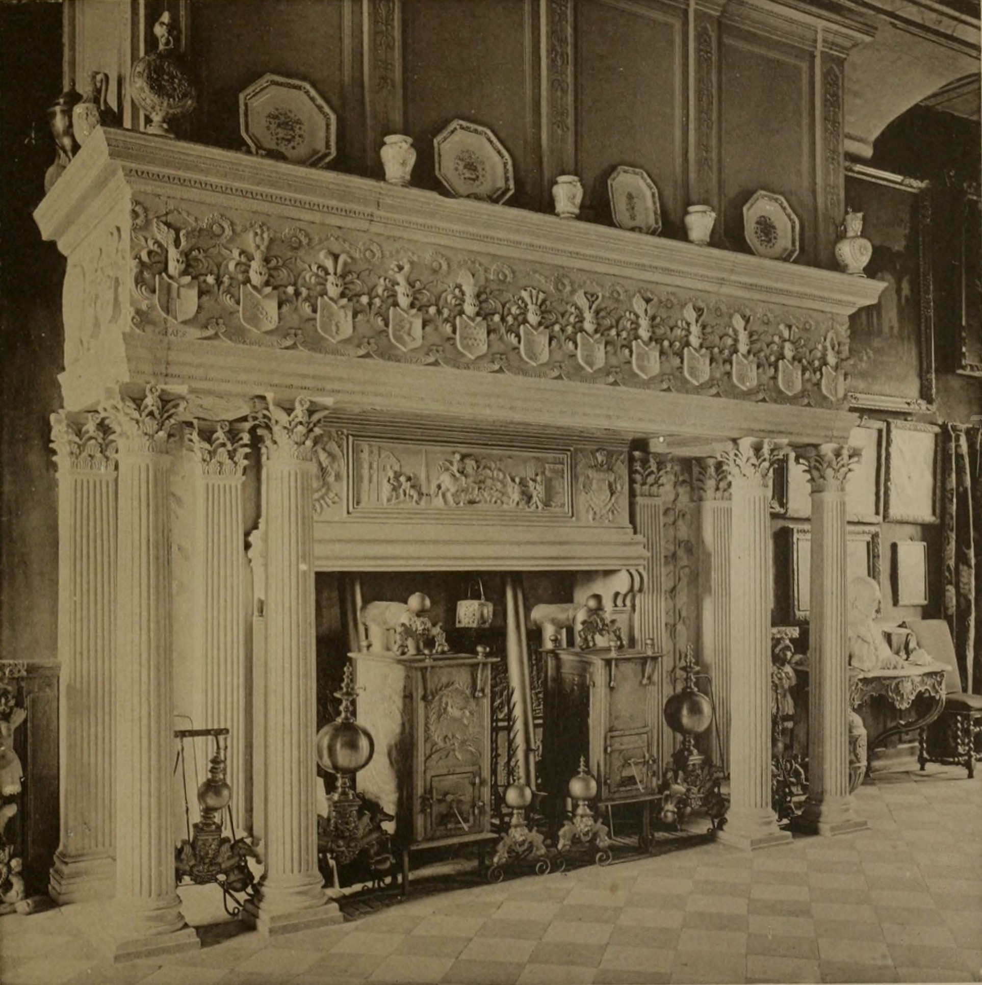 Haus Havixbeck im Münsterland, Kamin im Rittersaal